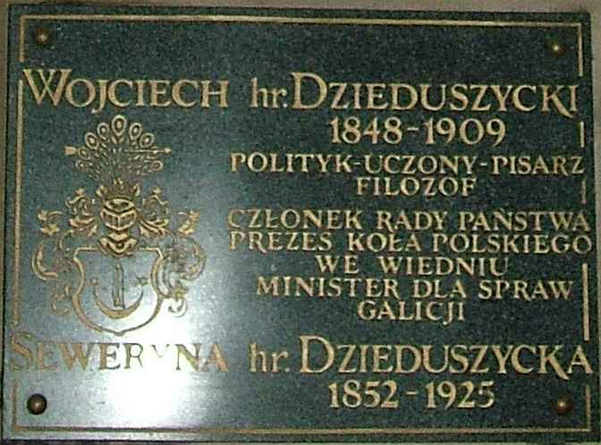 Lwów - Katedra Łacińska - tablica pamiątkowa Wojciecha Dzieduszyckiego.